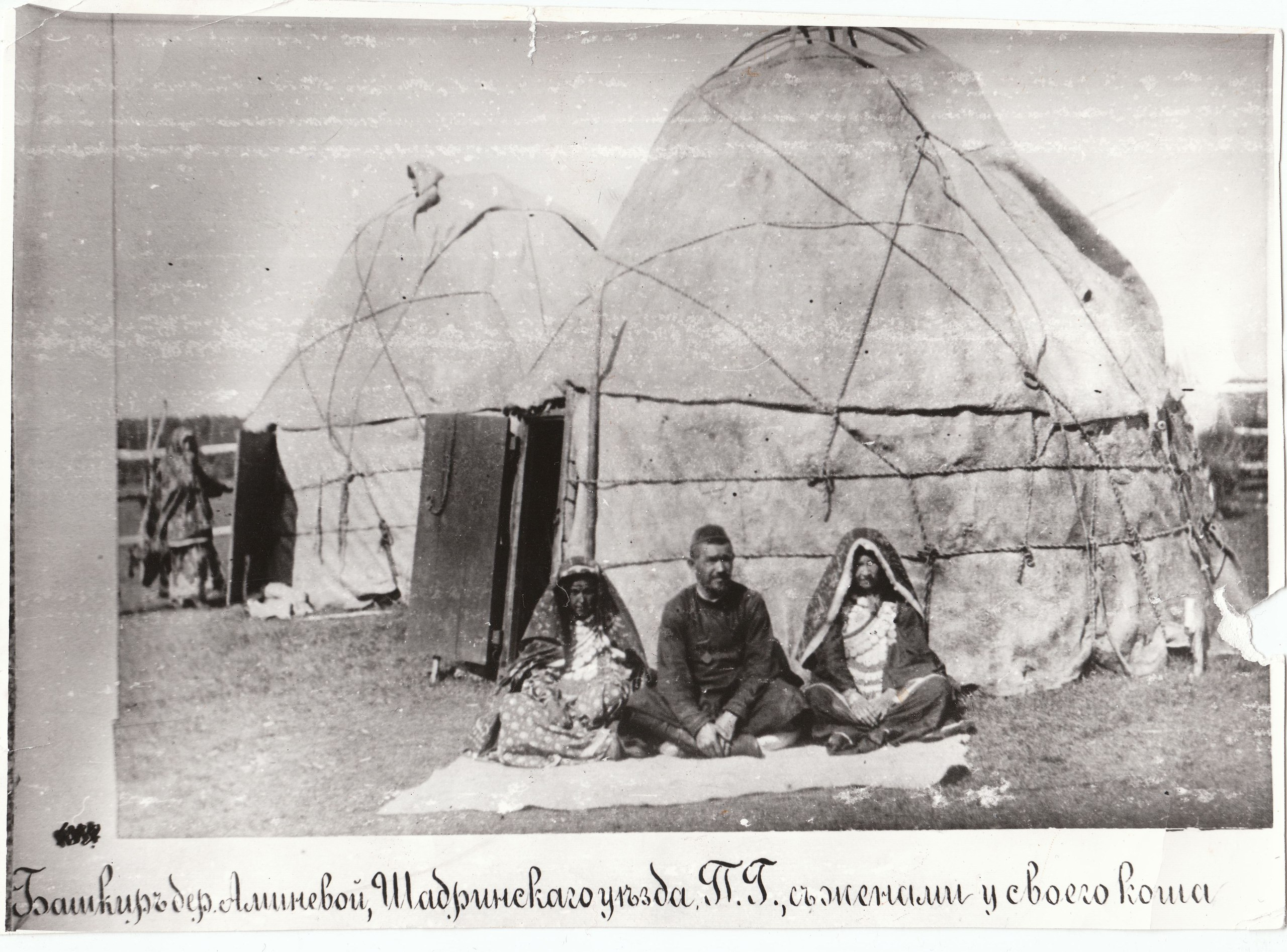 Башкиры д.Аминево, Шадринского уезда Пермской губернии